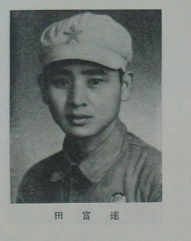 中文（台灣）: 中國人民政治協商會議第一屆全體會議代表